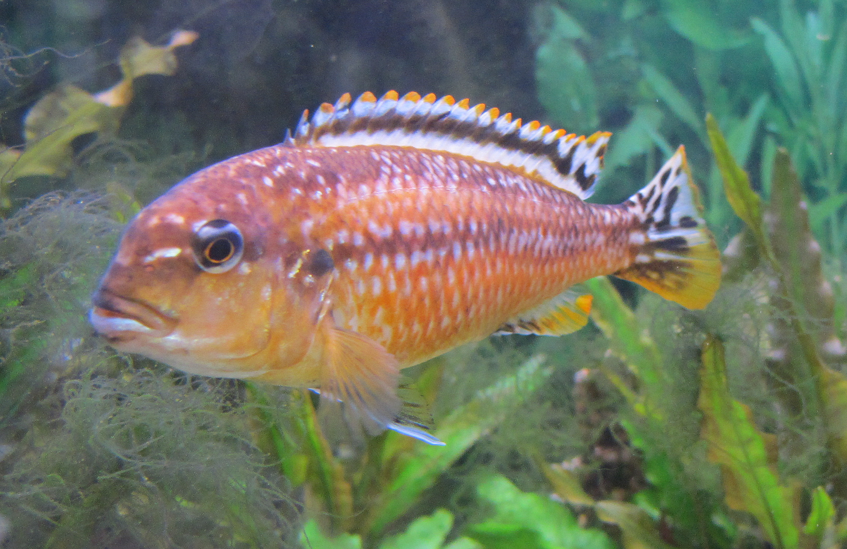 Melanochromis auratus (lac malawi)